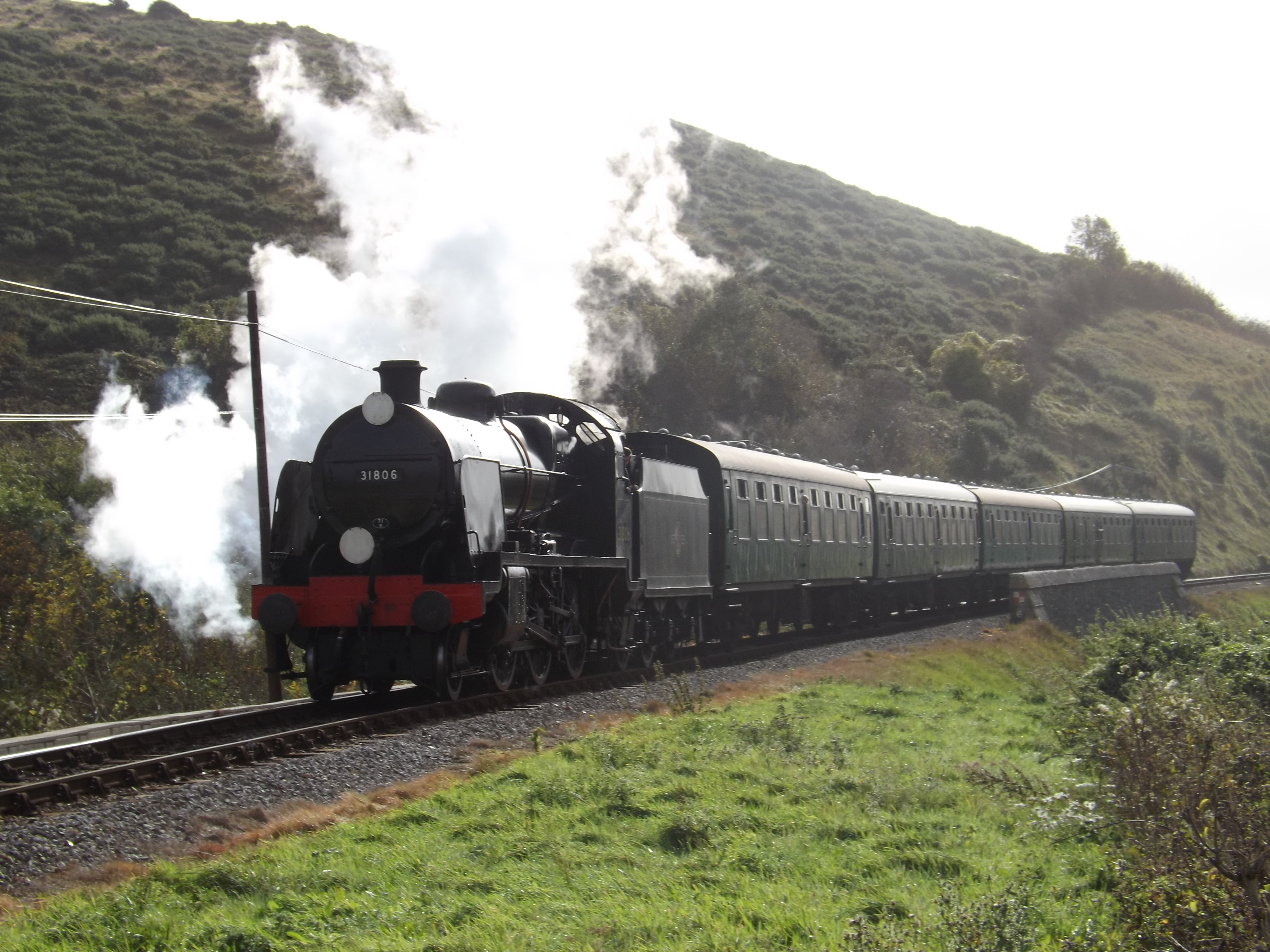 Loco was built between 1928-1931